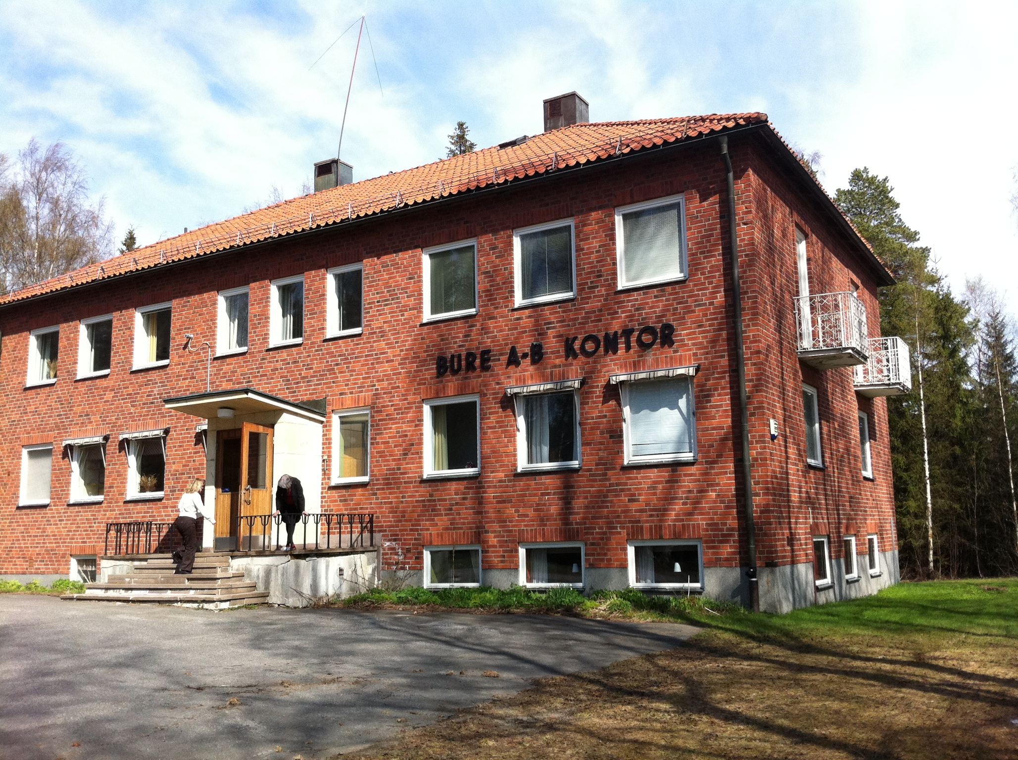 Bure AB:s huvudkontor i Bureå, ritat 1952 av Birger Dahlberg